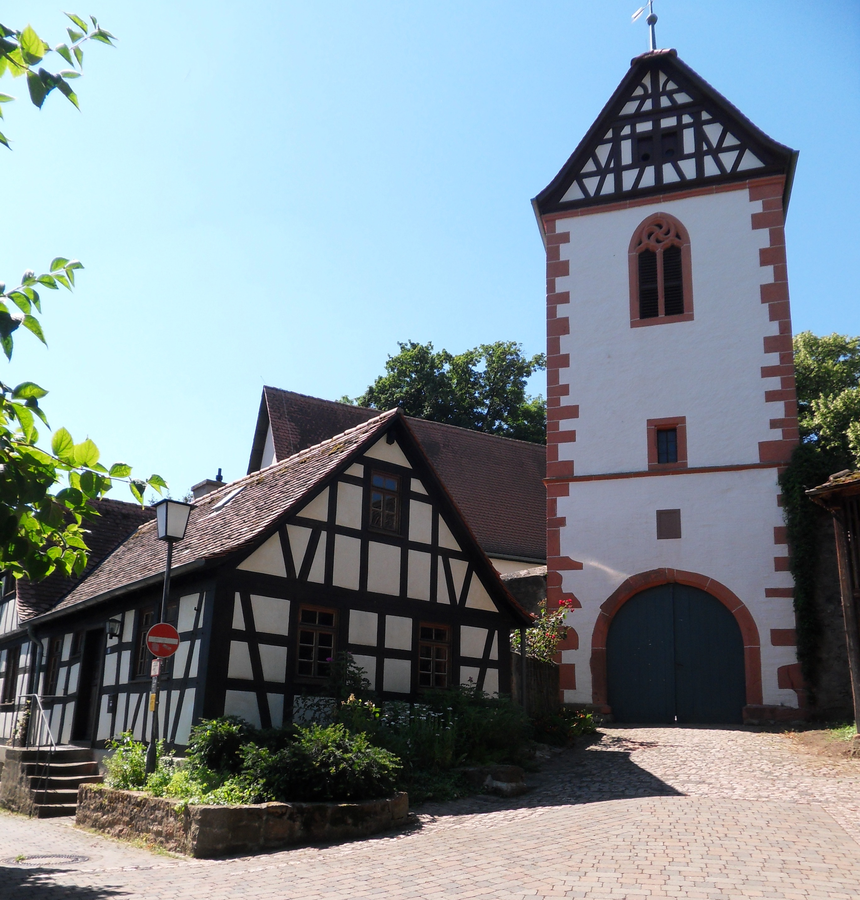 der Tor- und Glockenturm Pfarrberg 9 in Wersau in der den Kirchhof umgebenden Wehrmauer, daneben das kleine Fachwerkhäuschen Pfarrberg 11; im Hintergrund die Dachfläche der Kirche Pfarrberg 7